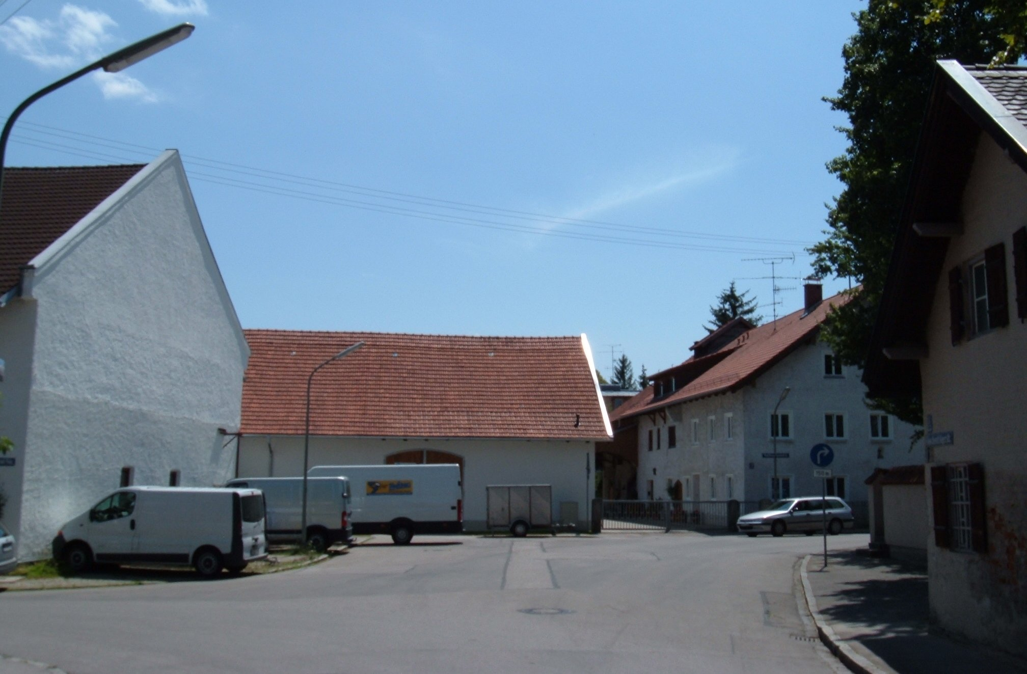 Häuser in Englschalking